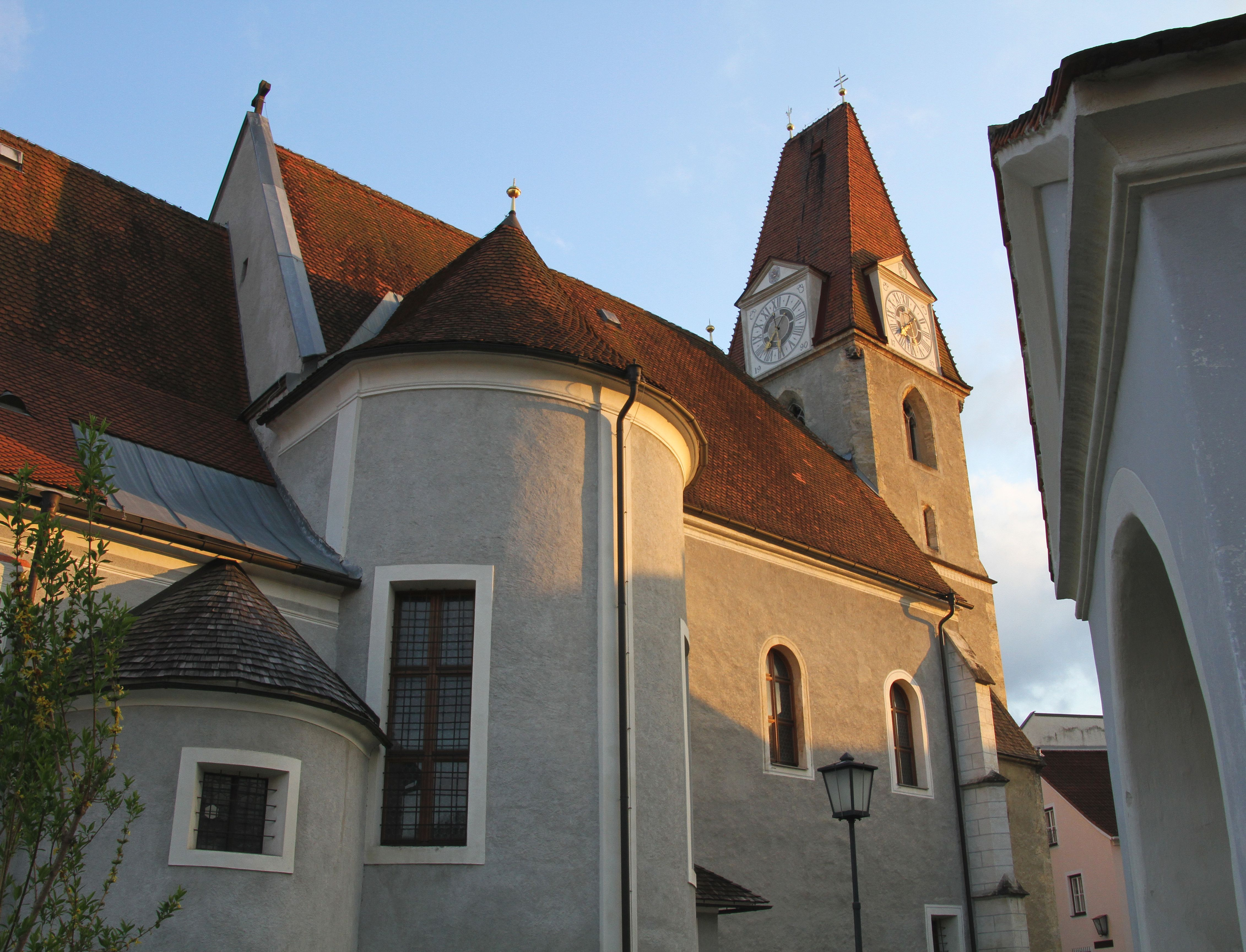 Kath. Pfarrkirche, Hl. Jakobus d. Ä.